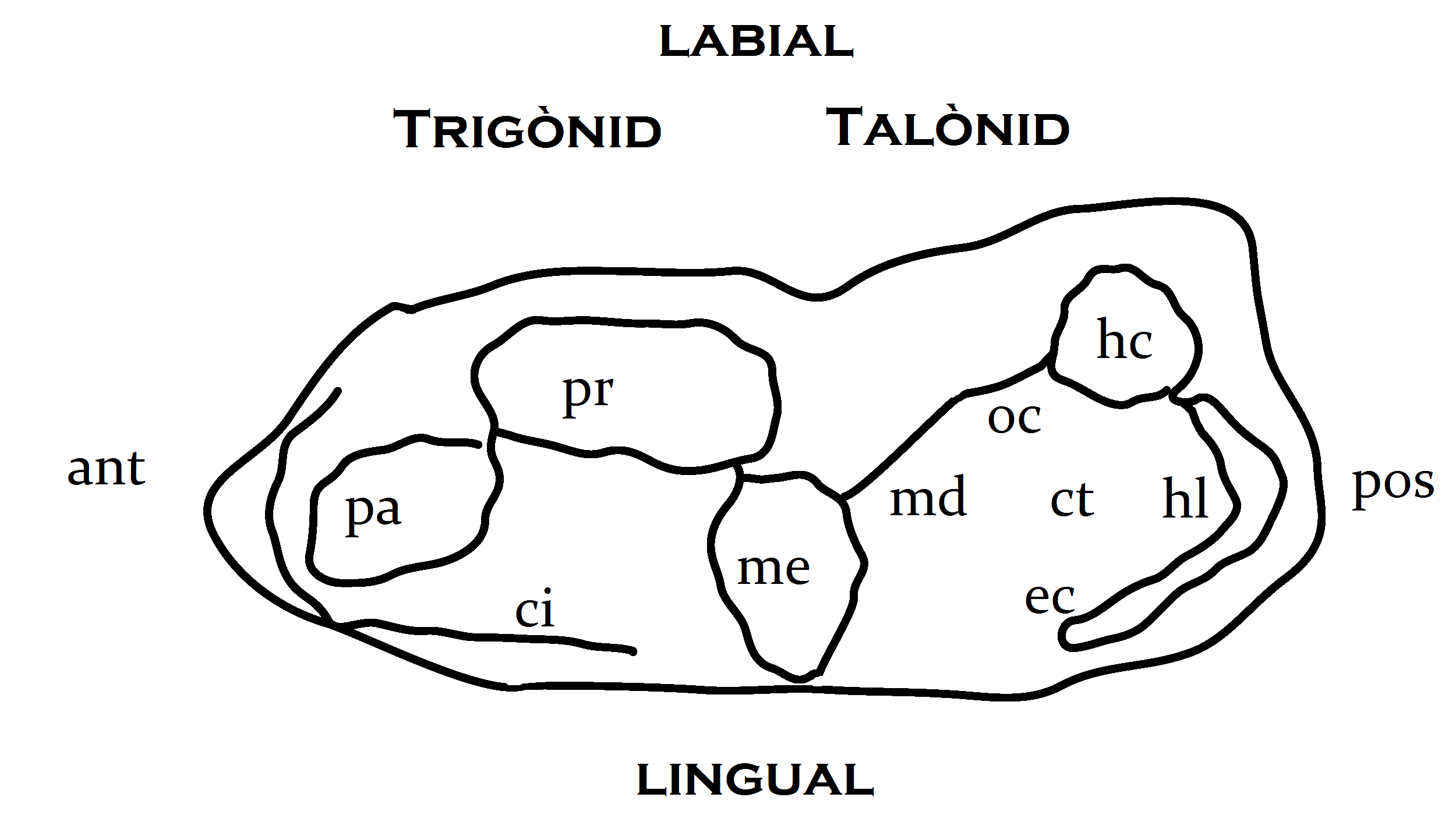 Diagrama etiquetat d'una molar generalitzada de mamífer australosfènid. Basat en Flynn et al. (1999, Nature 401, p. 58, fig. 2) i Rougier et al. (2007, American Museum Novitates 3566, p. 13). Ant: anterior; pos: posterior; ci: cíngol; pa: paracònid; pr: protocònid; me: metacònid; md: metacrístid distal; oc: obliqua del crístid; hc: hipocònid; hl: hipoconúlid; ec: entocrístid; ct: conca del talònid.